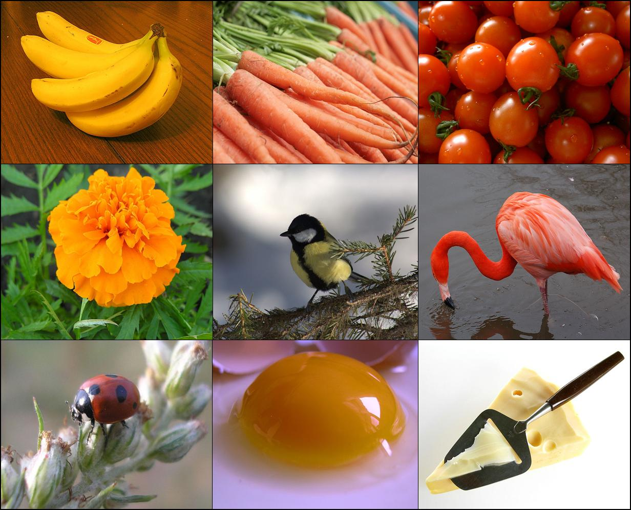 Vorkommen von Carotinoiden in der Natur und in Lebensmitteln